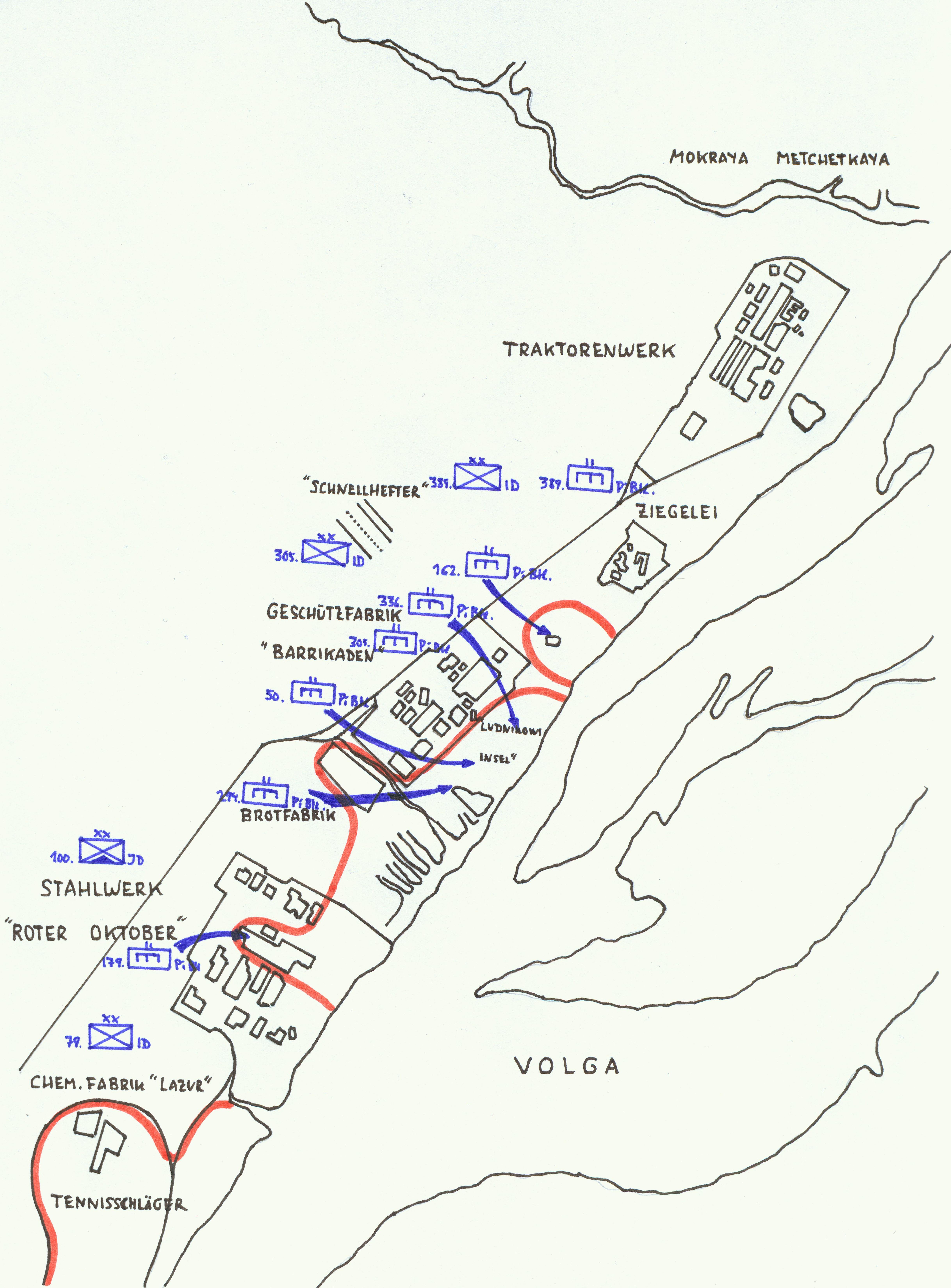 Gefechtsskizze Operation Hubertus November 1942